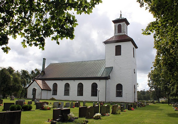 Holsljunga kyrka i Svenljunga kommun i Västergötland